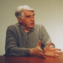 Francis Lacassin, éditeur français.